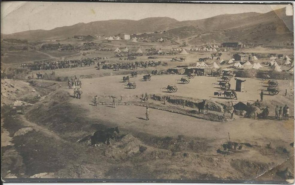 Италиански лагер край Гнилеж